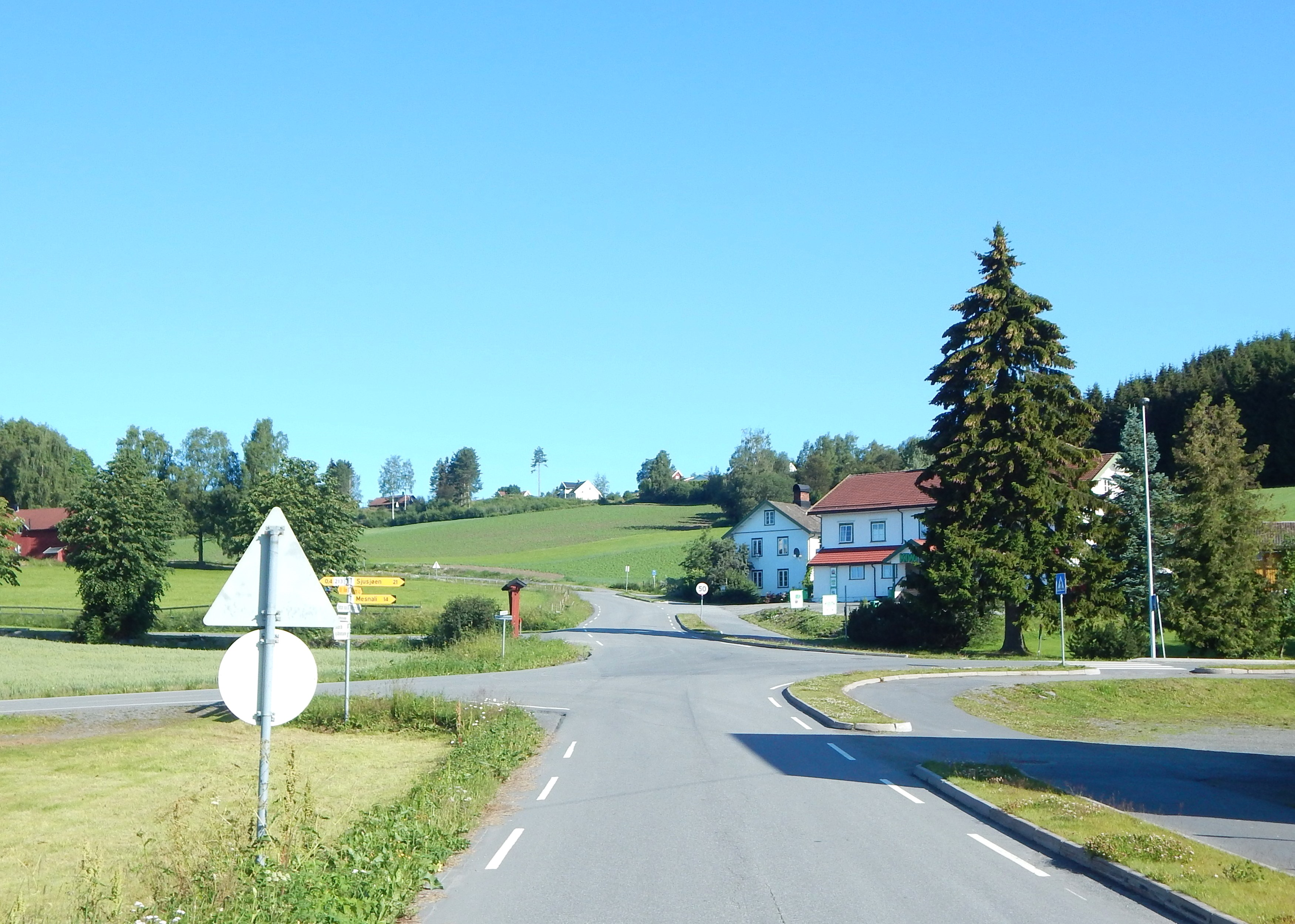 Bygdesentrum i Brøttum er omtrent der fylkesvei 1656 krysser fylkesvei 1658.